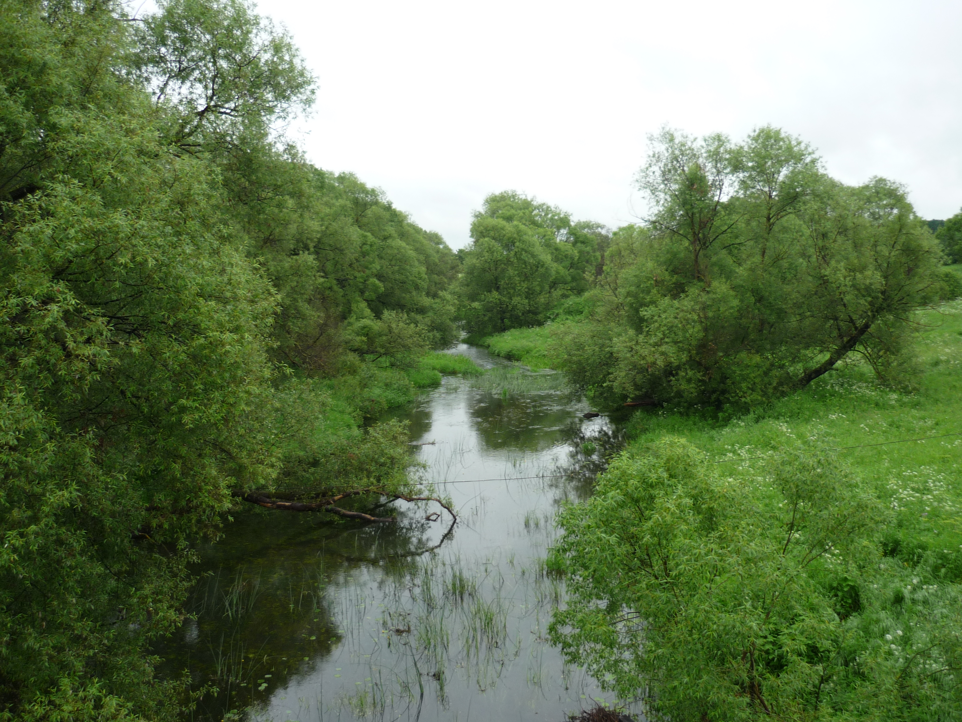 Река лосьмина в Сычёвке